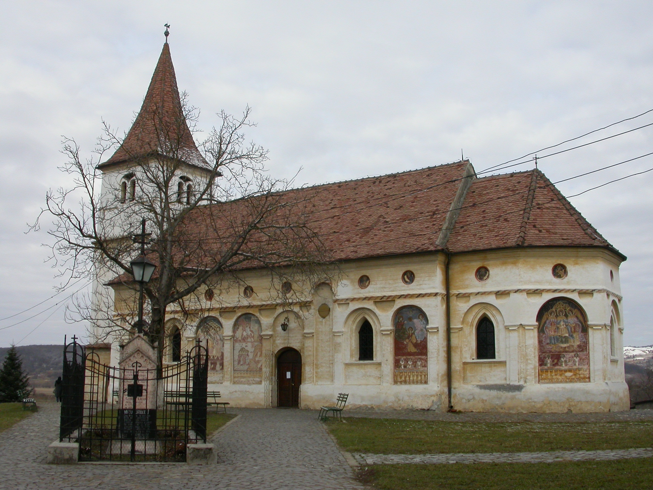 Biserica "Duminica Floriilor" Avrig, mijl. sec. XVIII